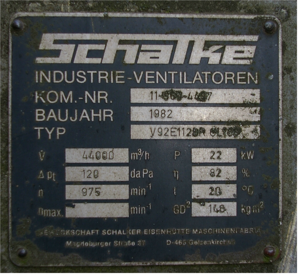 Typschild-Schalke